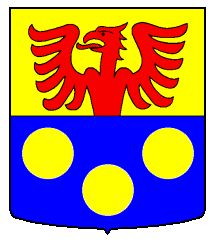 Wappen von Cheiry Kanton Freiburg Schweiz